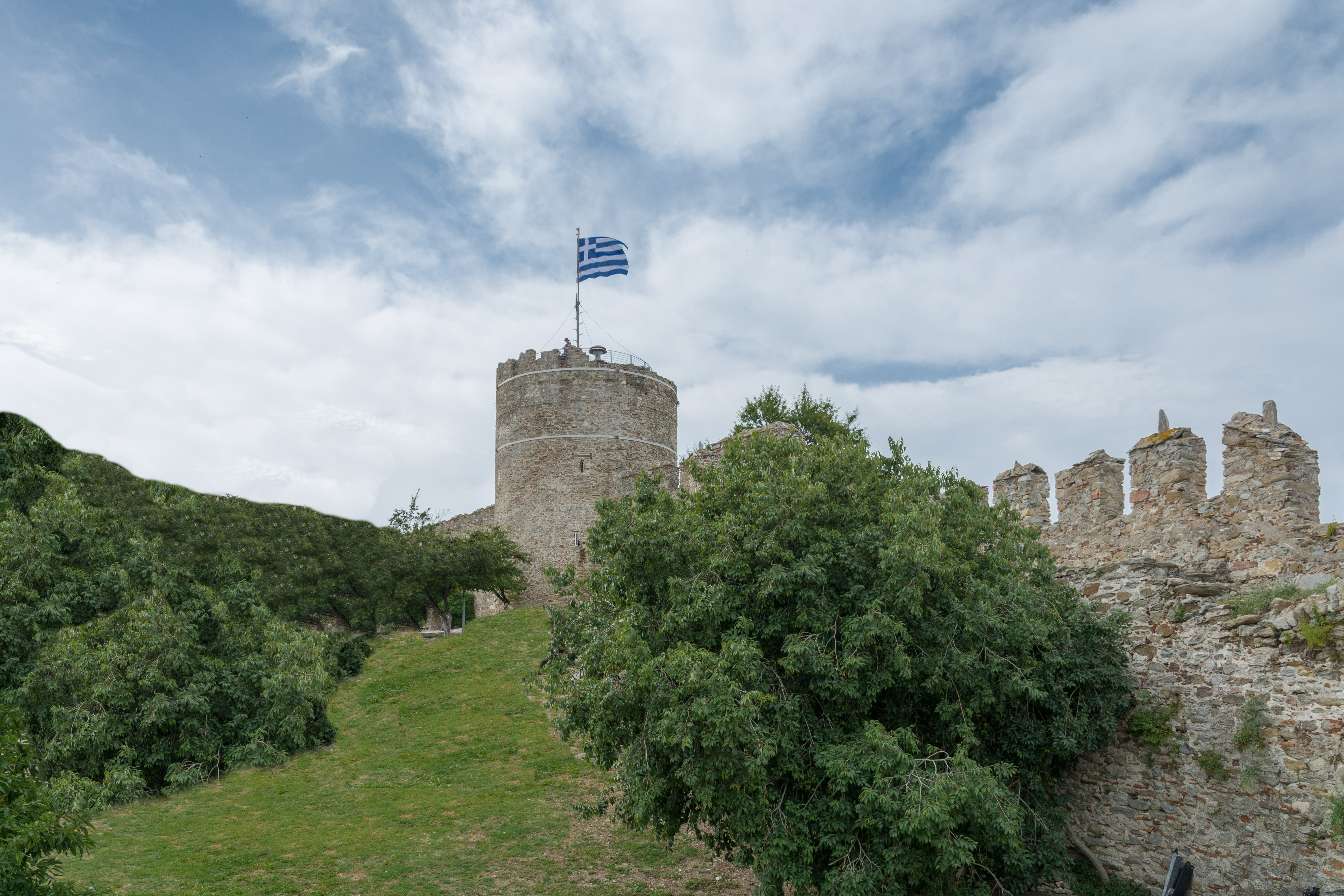 Καβάλα - Ανατολικής Μακεδονίας και Θράκης